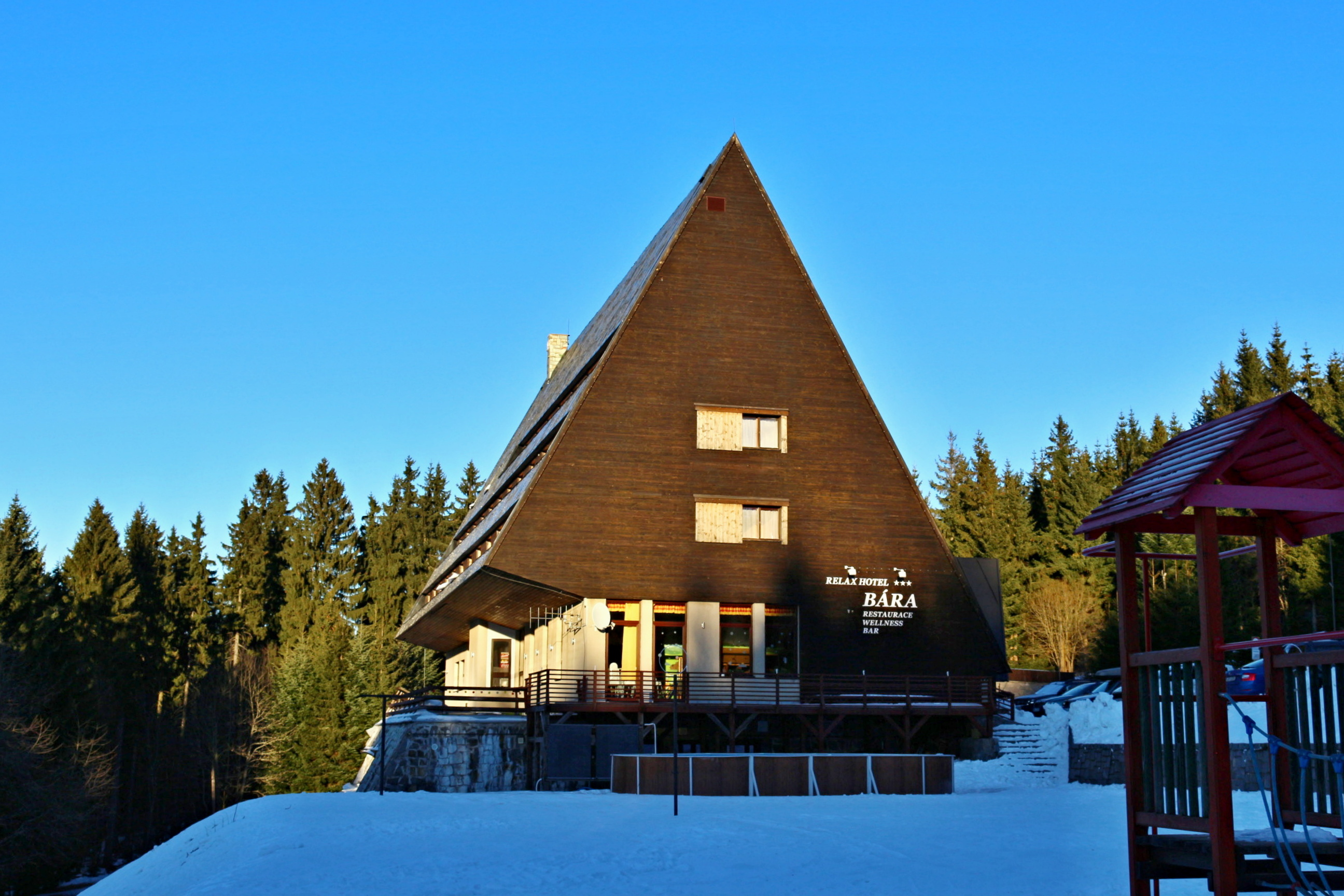 Benecko